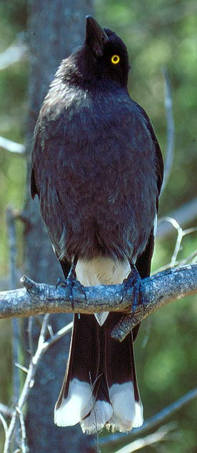 Réveilleur cendré Strepera versicolor